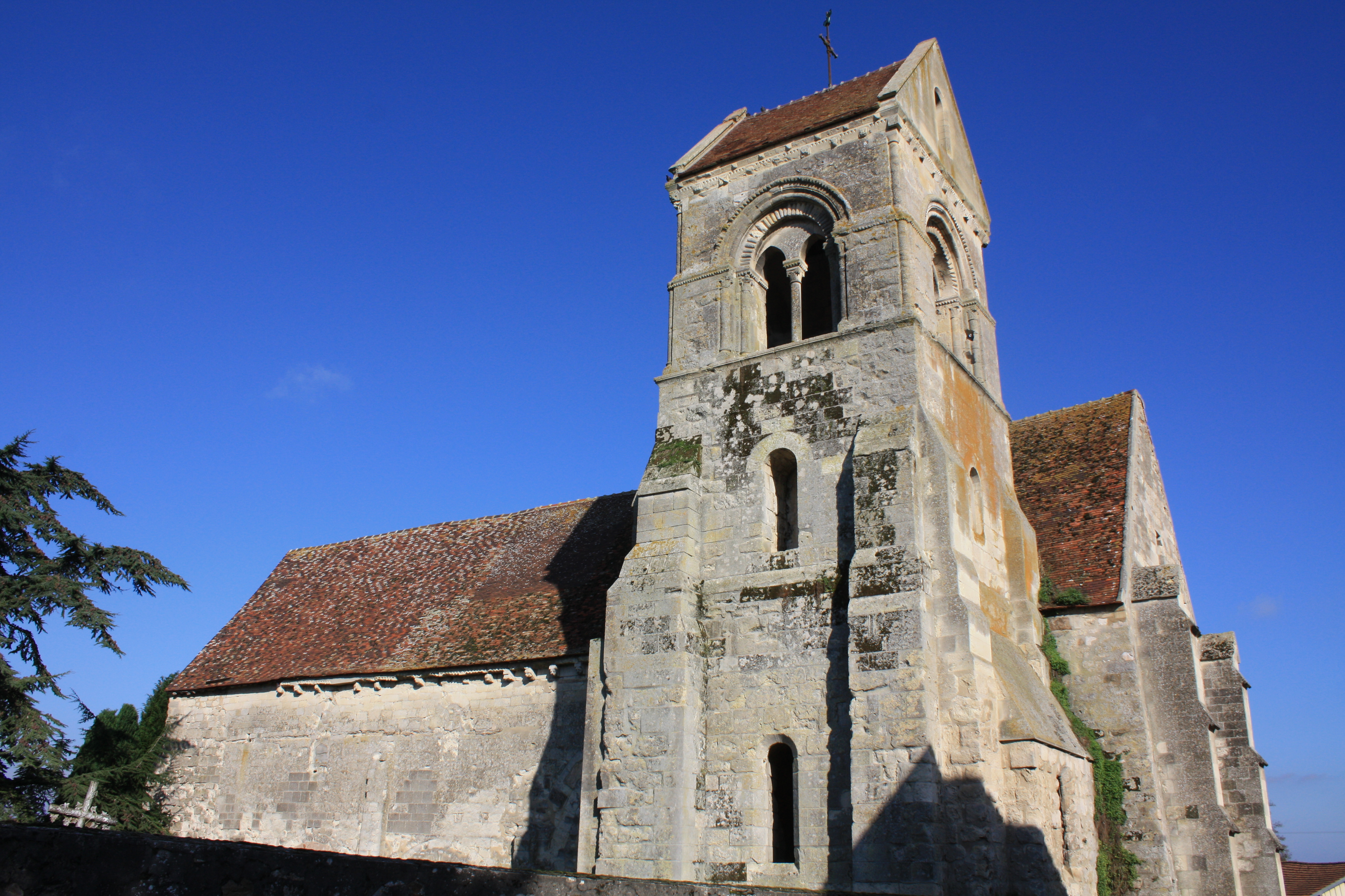 Église Notre-Dame de La Croix-sur-Ourcq